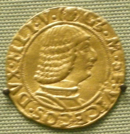 Ducato d'oro di galeazzo maria sforza